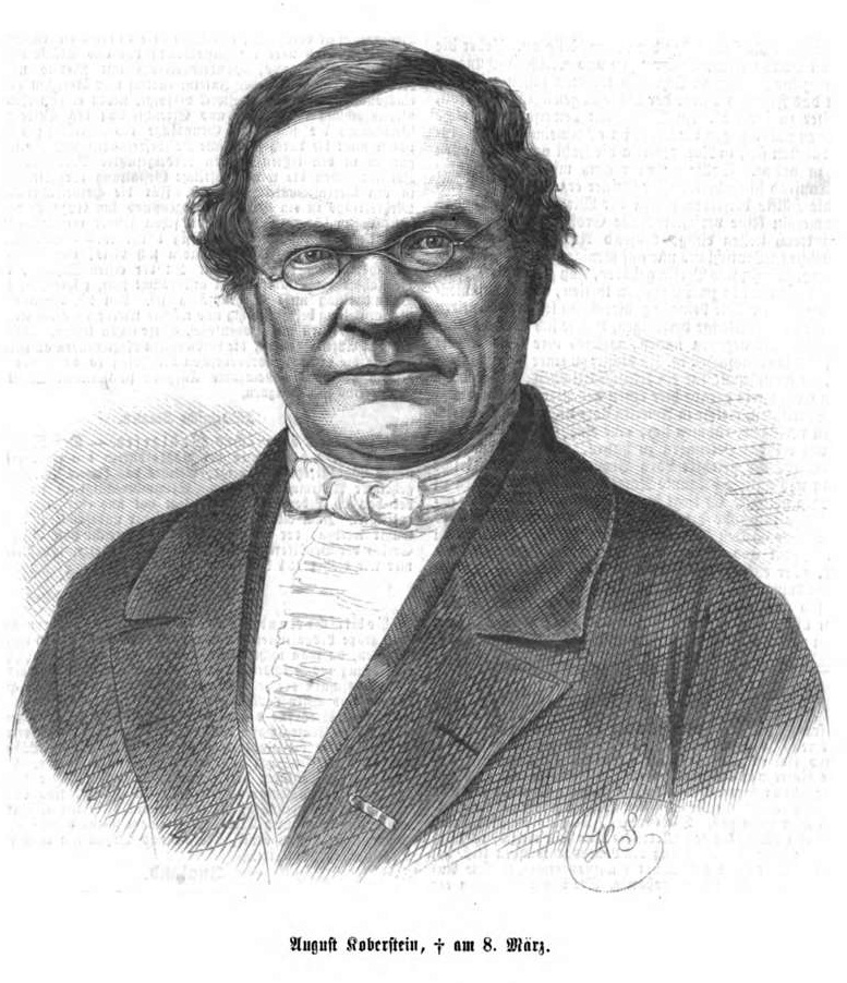 Karl August Koberstein, deutscher Literaturhistoriker im 19. Jh.